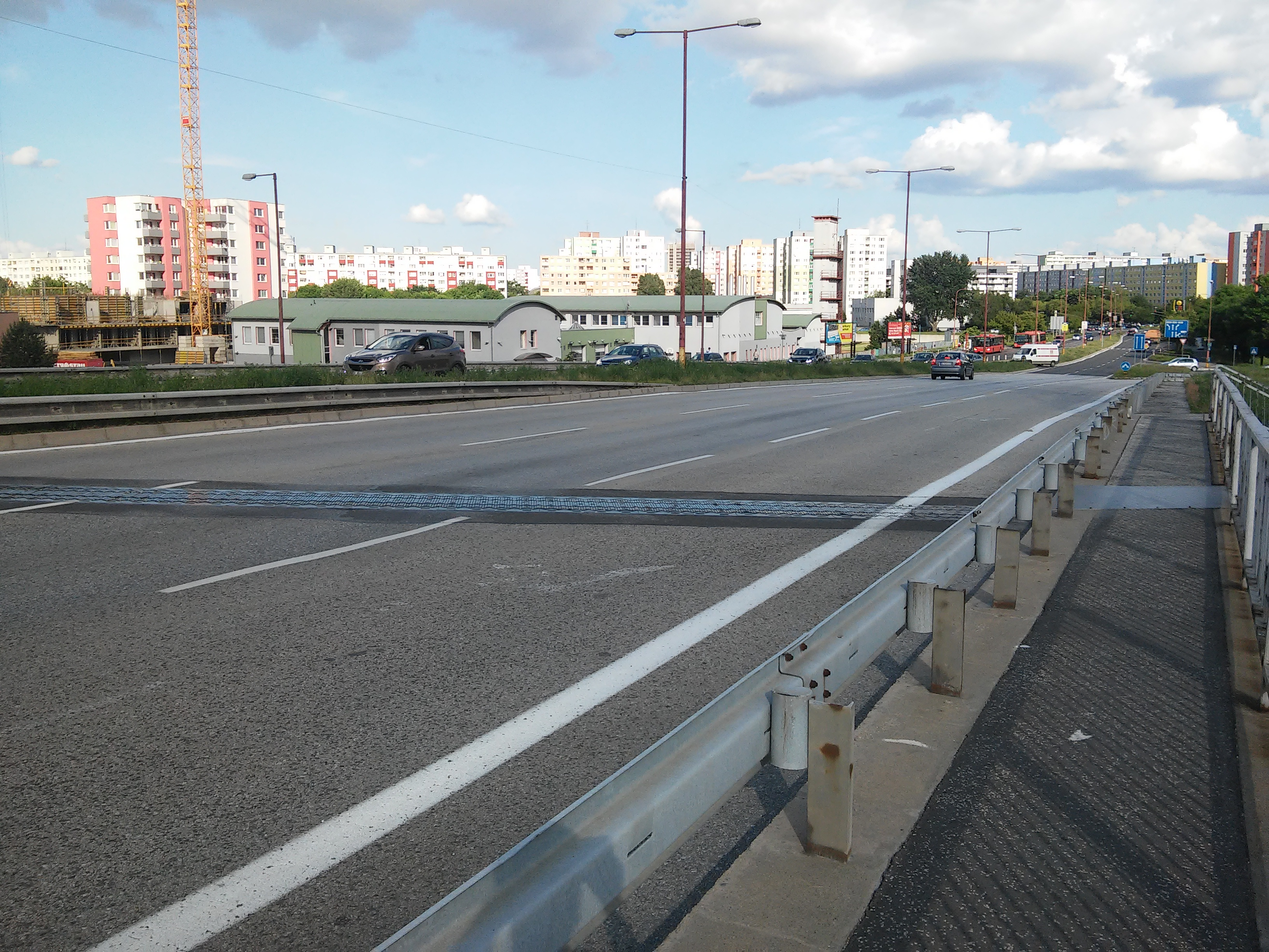 Bratská, Petržalka, Bratislava